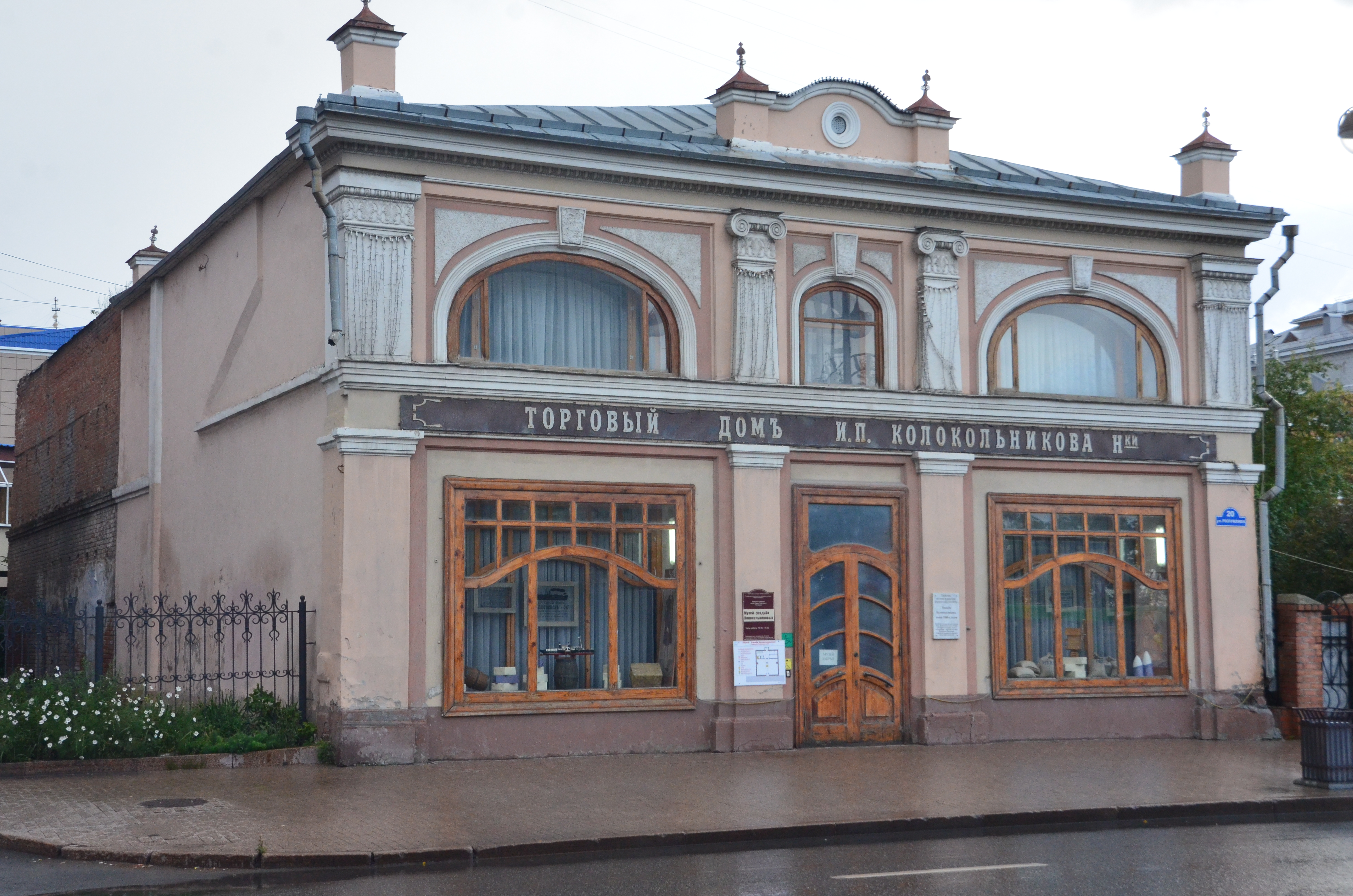 Усадьба Колокольникова: улица Республики, 20, Тюмень, Тюменская область